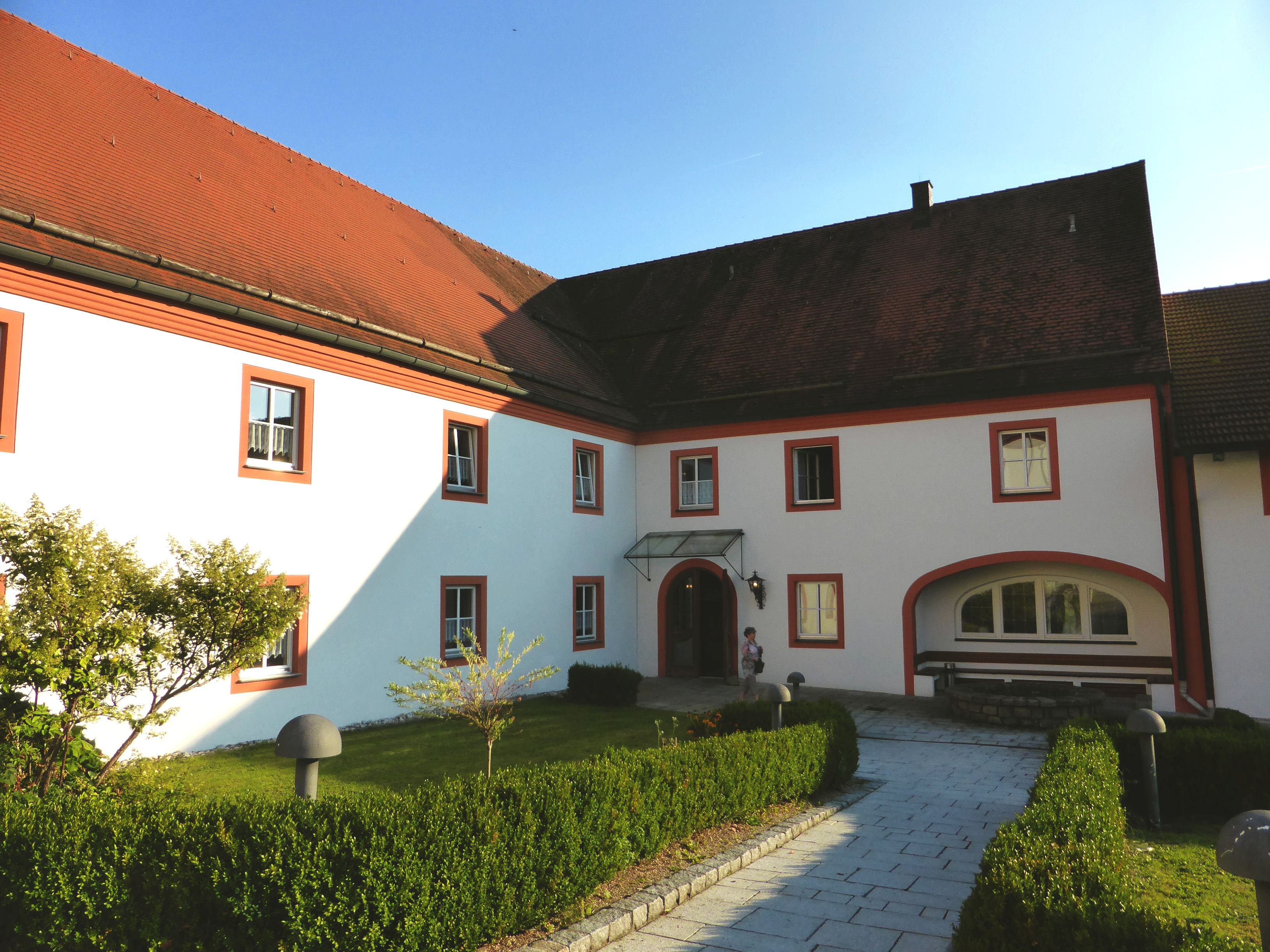 Schloss Blaibach - Nebengebäude